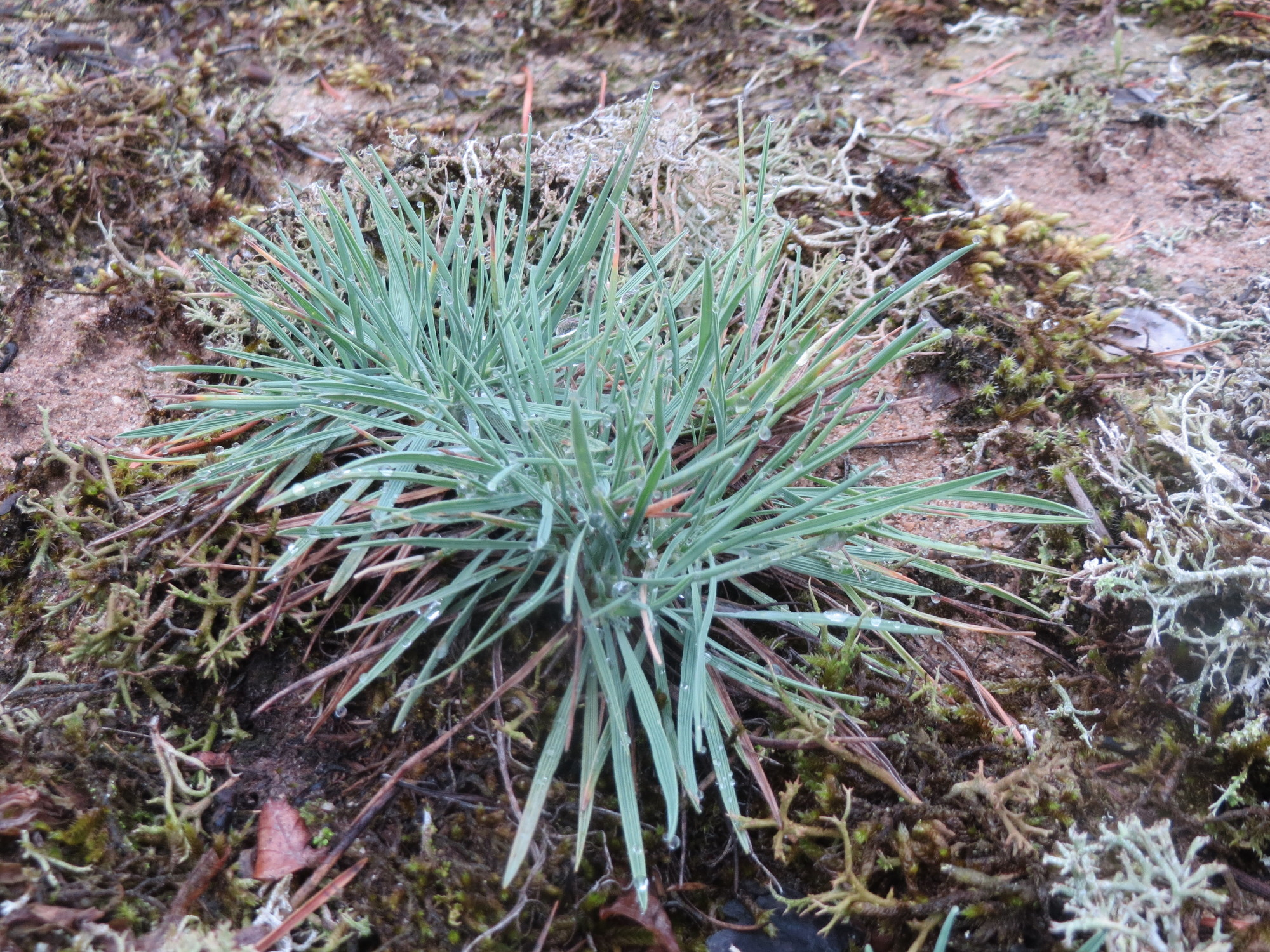 Das seltene Blaugrüne Schillergras (Koeleria glauca) auf einer Binnendüne im Schwetzinger Hardt